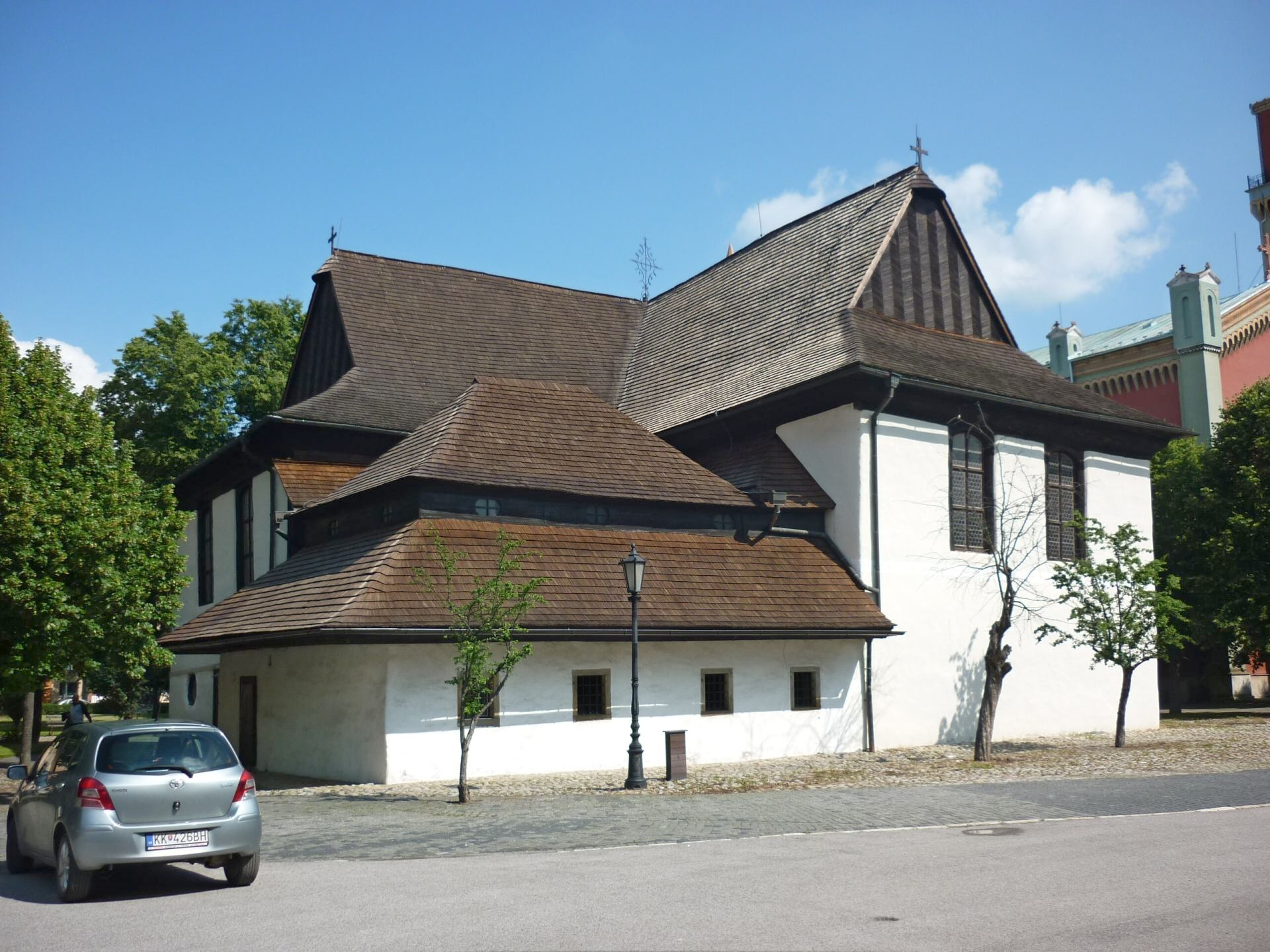 Kežmarok - Slovensko